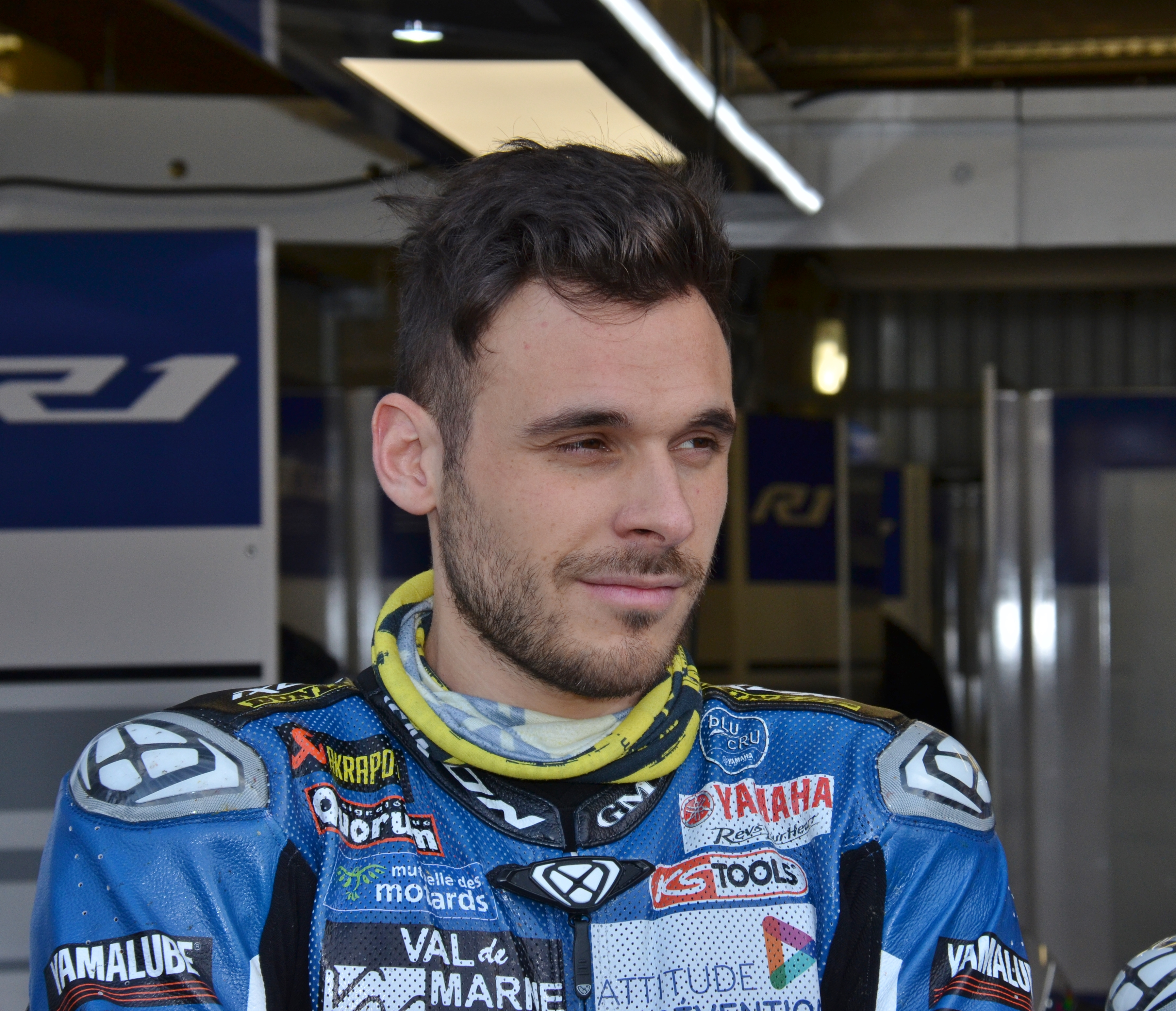 Niccolò Canepa aux pré-Mans 2017